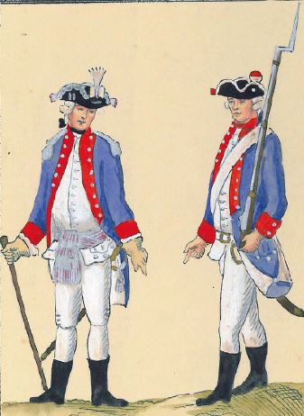 72. Regiment Pieszy Massalskiego